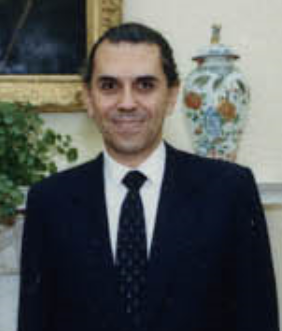 Embajador Enrique Candioti